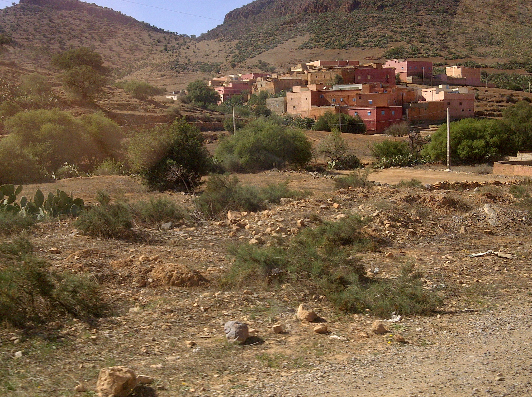 village